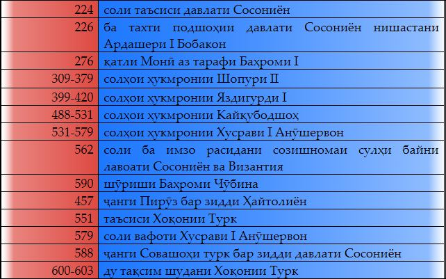 Тоҷикӣ: Акси санаҳои муҳими таърихи Давлати Сосониён